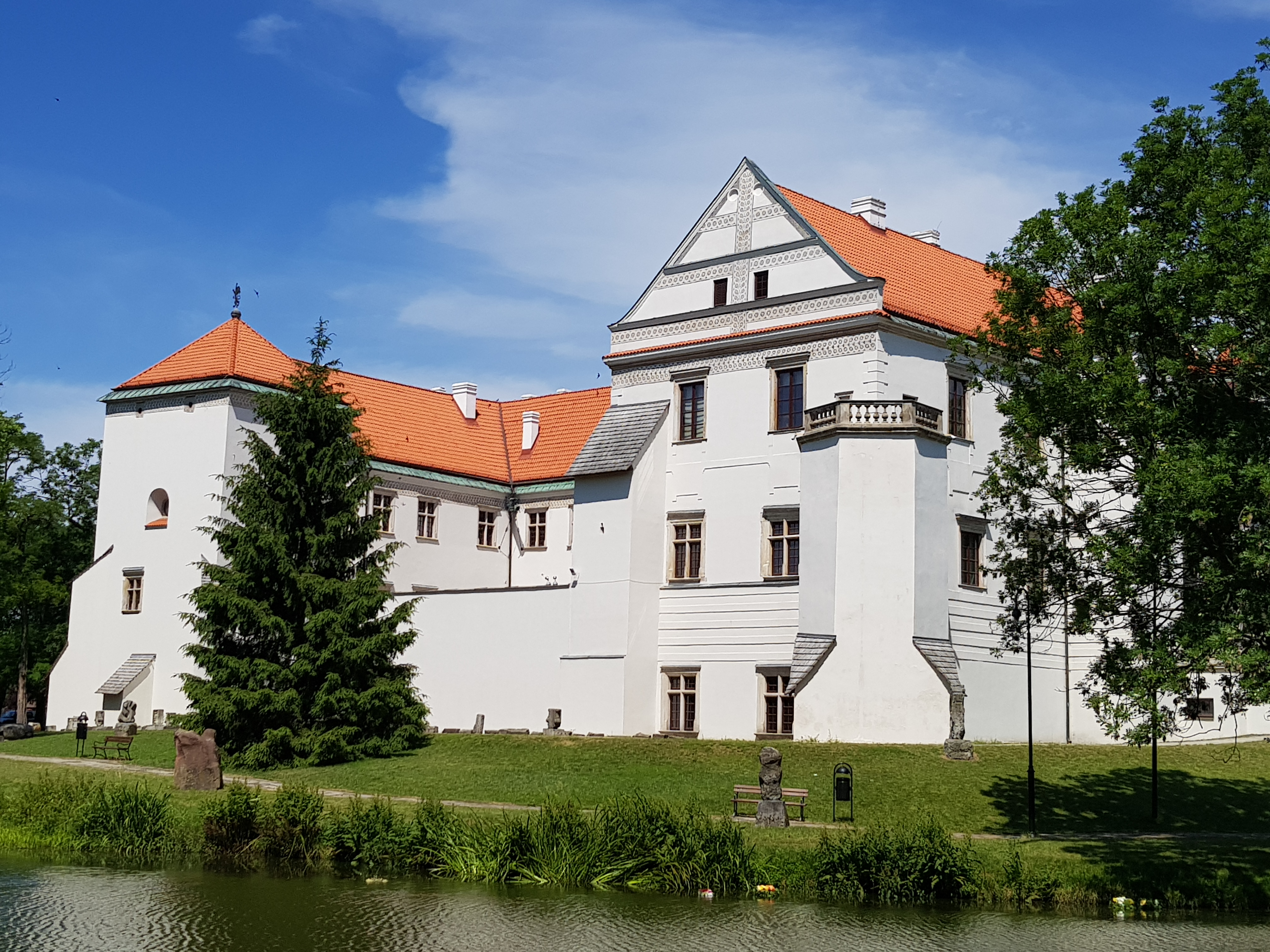 widok zamku